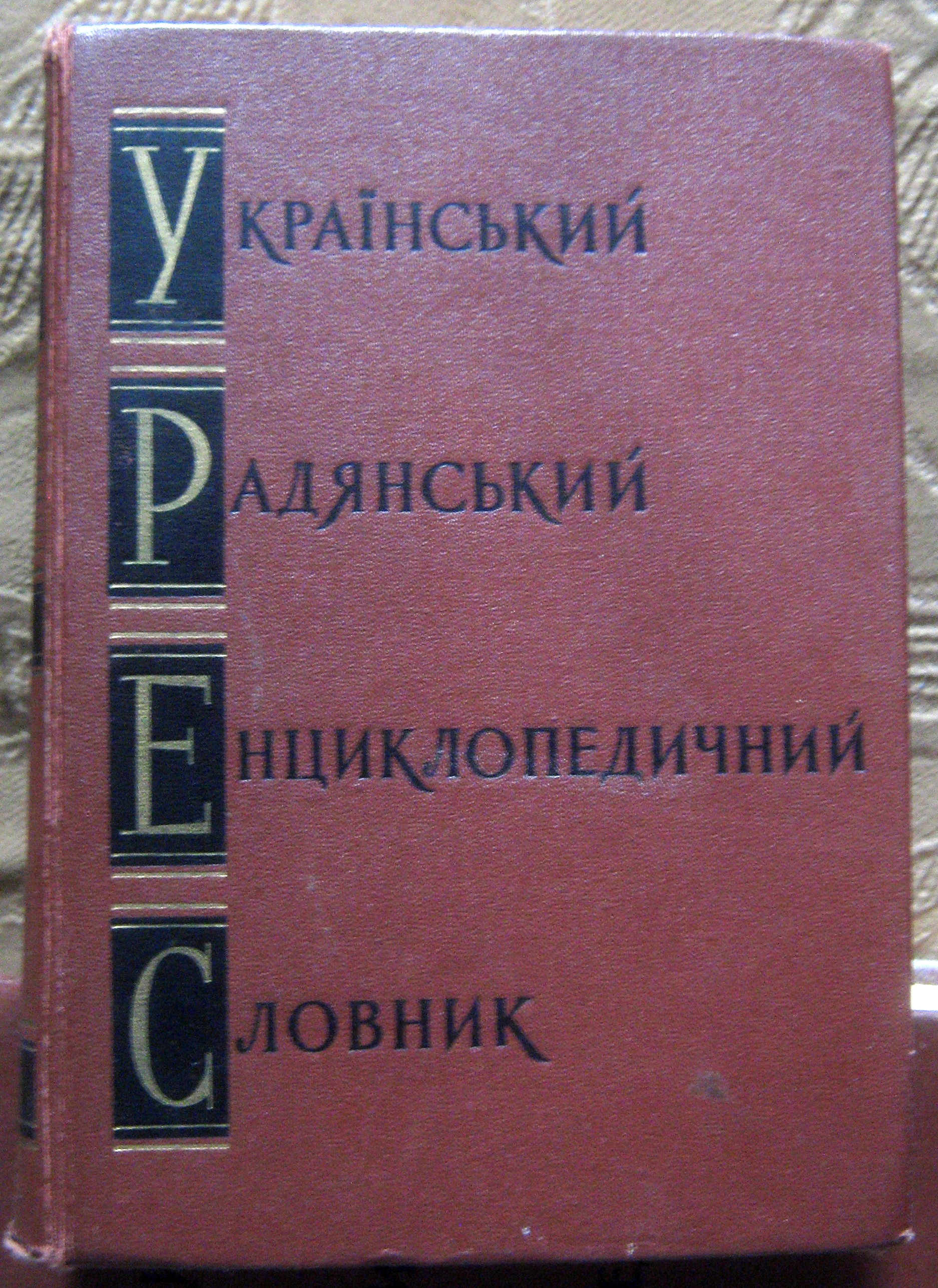 Обкладинка першого тому першого видання Українського Радянського Енциклопедичного Словника. Беларуская (тарашкевіца): Вокладка першага тома першага выданьня Украінскага Савецкага Энцыкляпэдычнага Слоўніка.